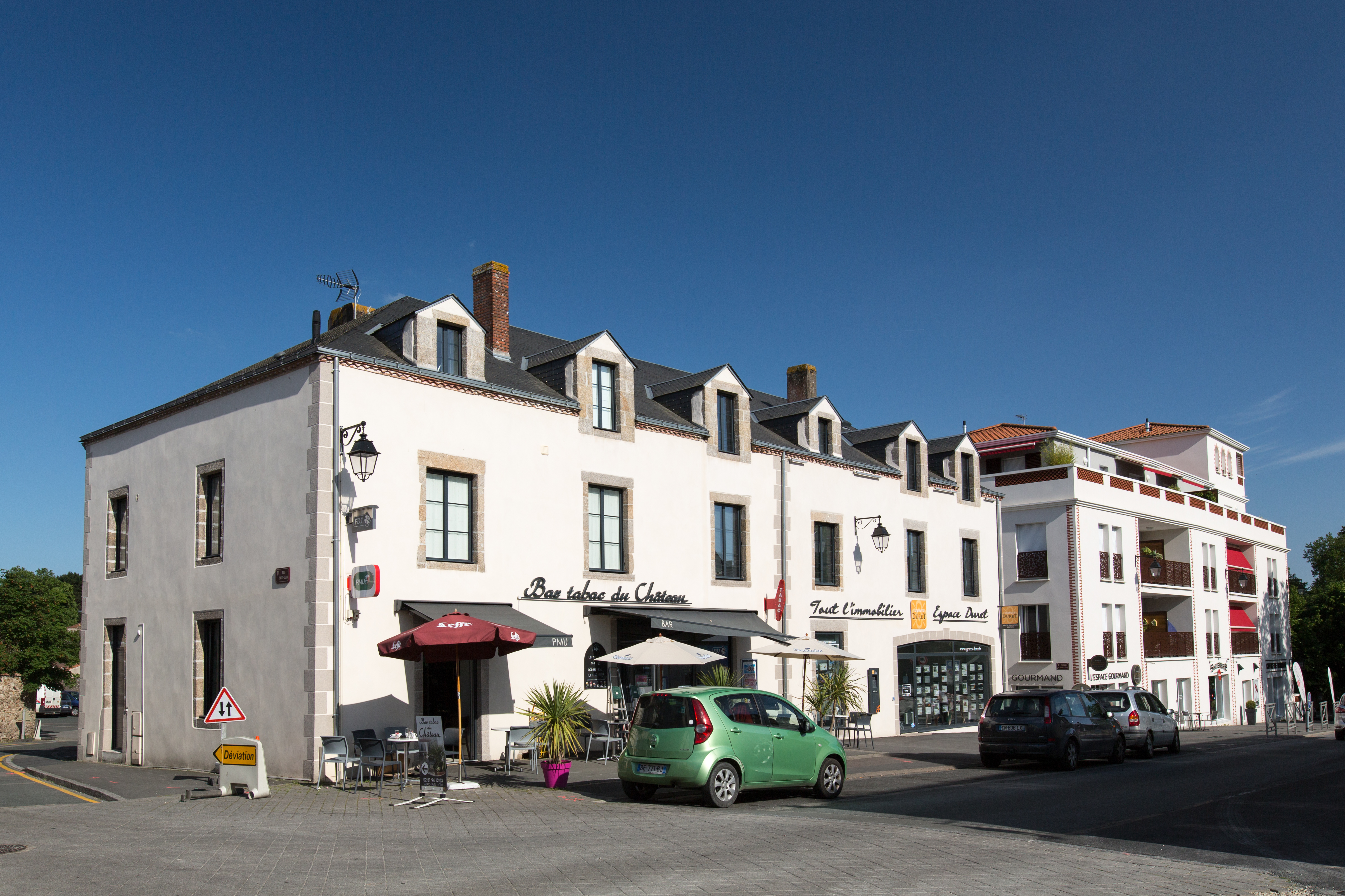 Bar tabac du Château